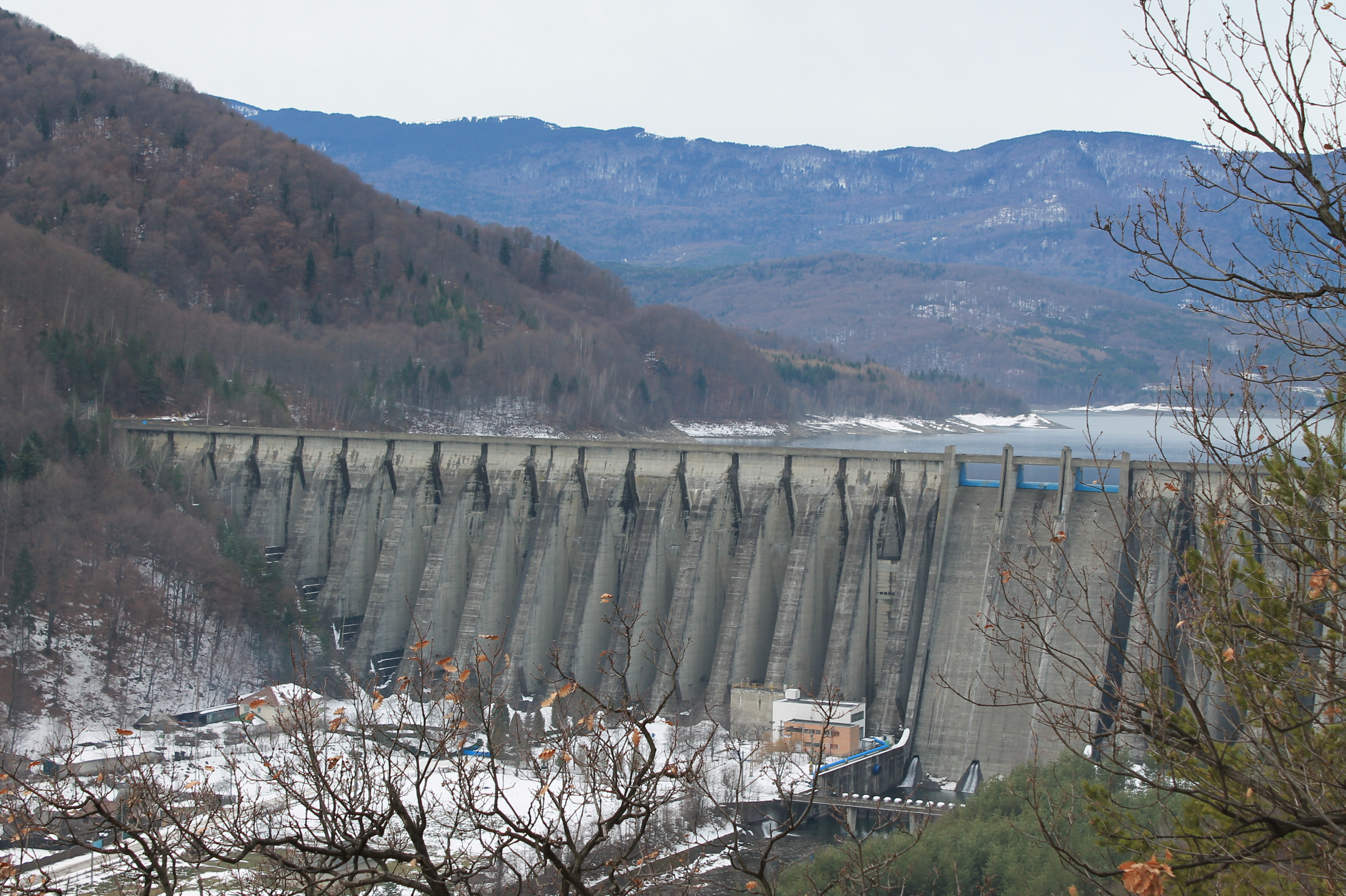 Baraj Valea Uzului